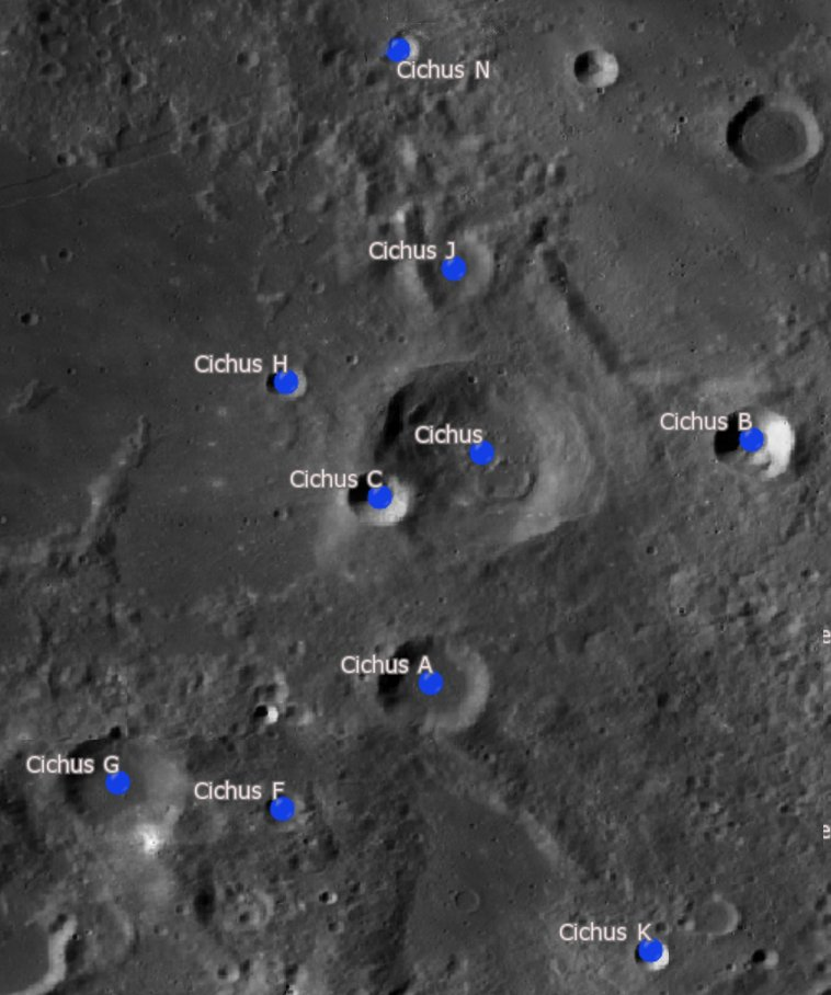 Cráter Cichus (LRO)